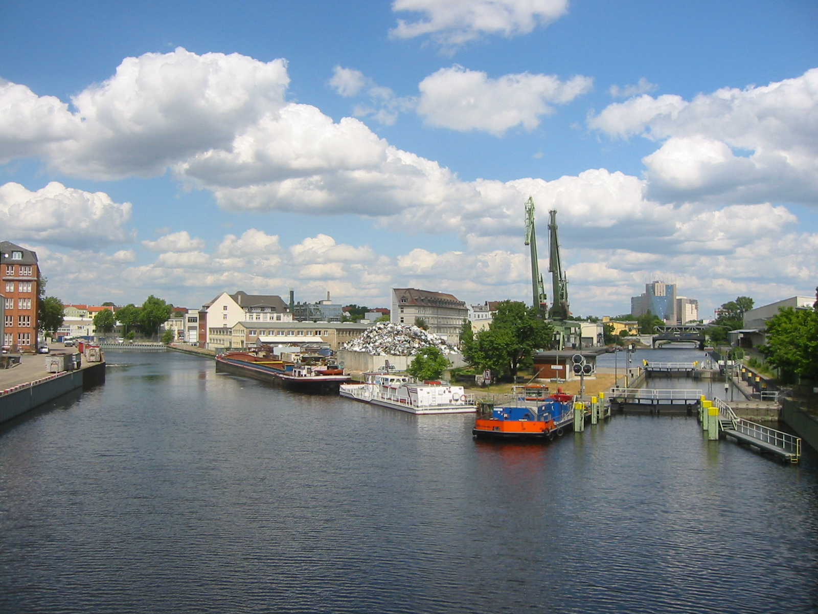 Blick auf den Hafen Neukölln mit Schleuse, aufgenommen von der Grenzallee